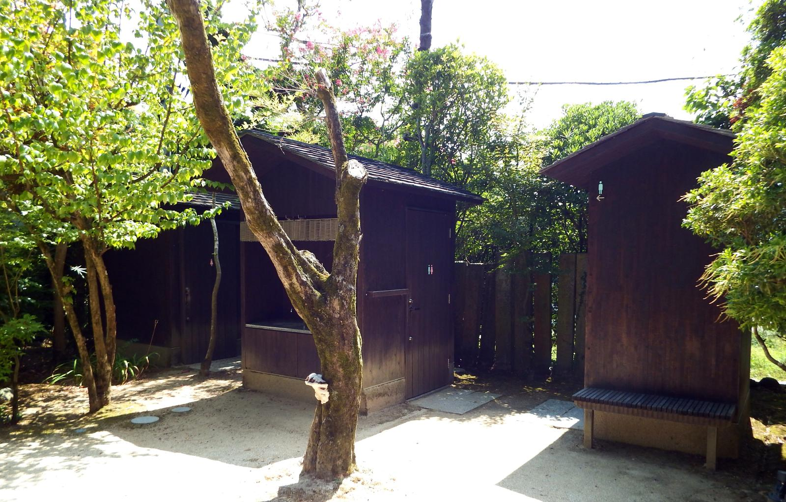 栄福寺のトイレ